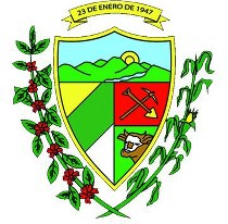 Esudo del Cantón Puyango